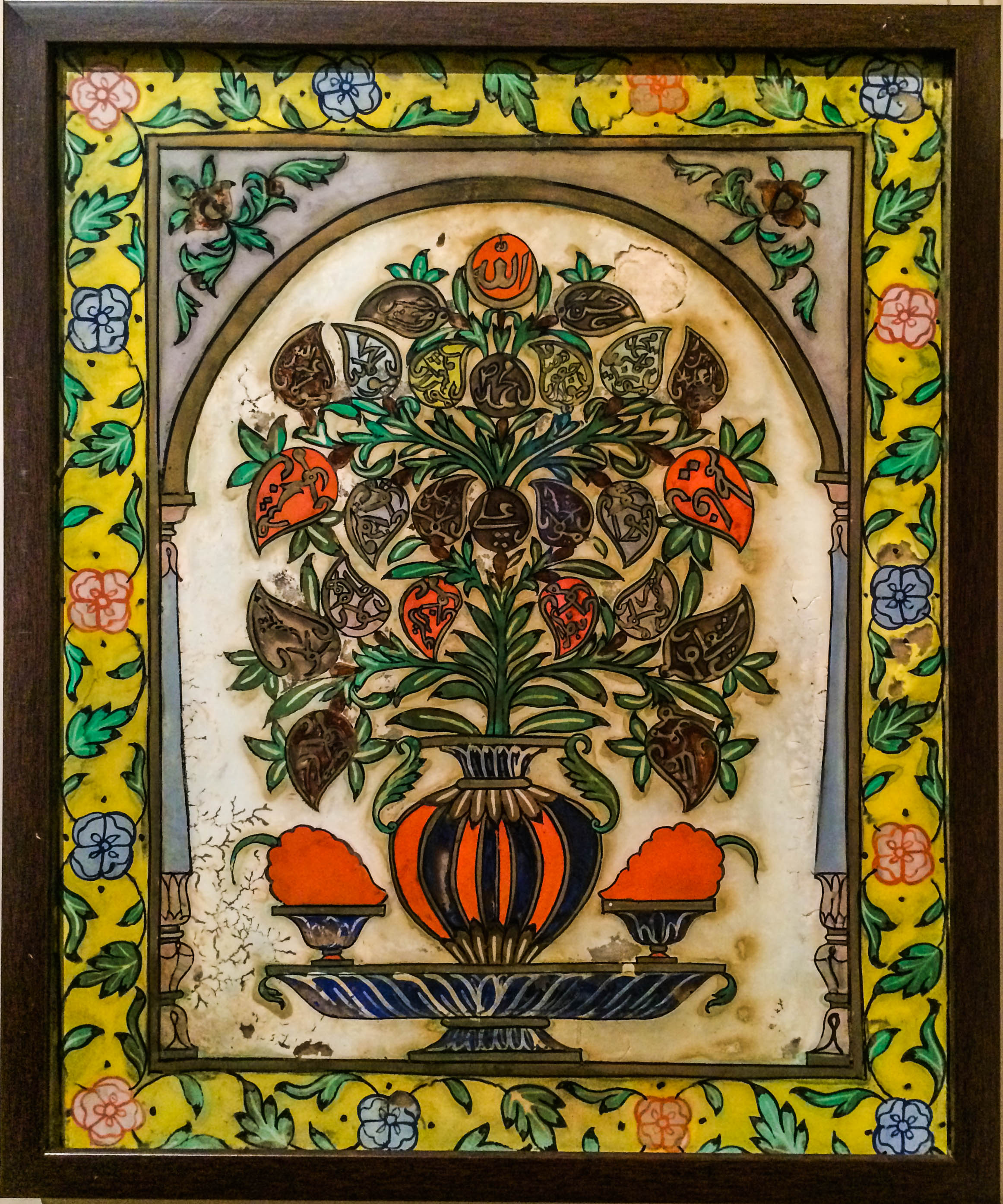 Həyat ağacı, şüşə üzərində rəsm, Qarabağ, XVIII əsr